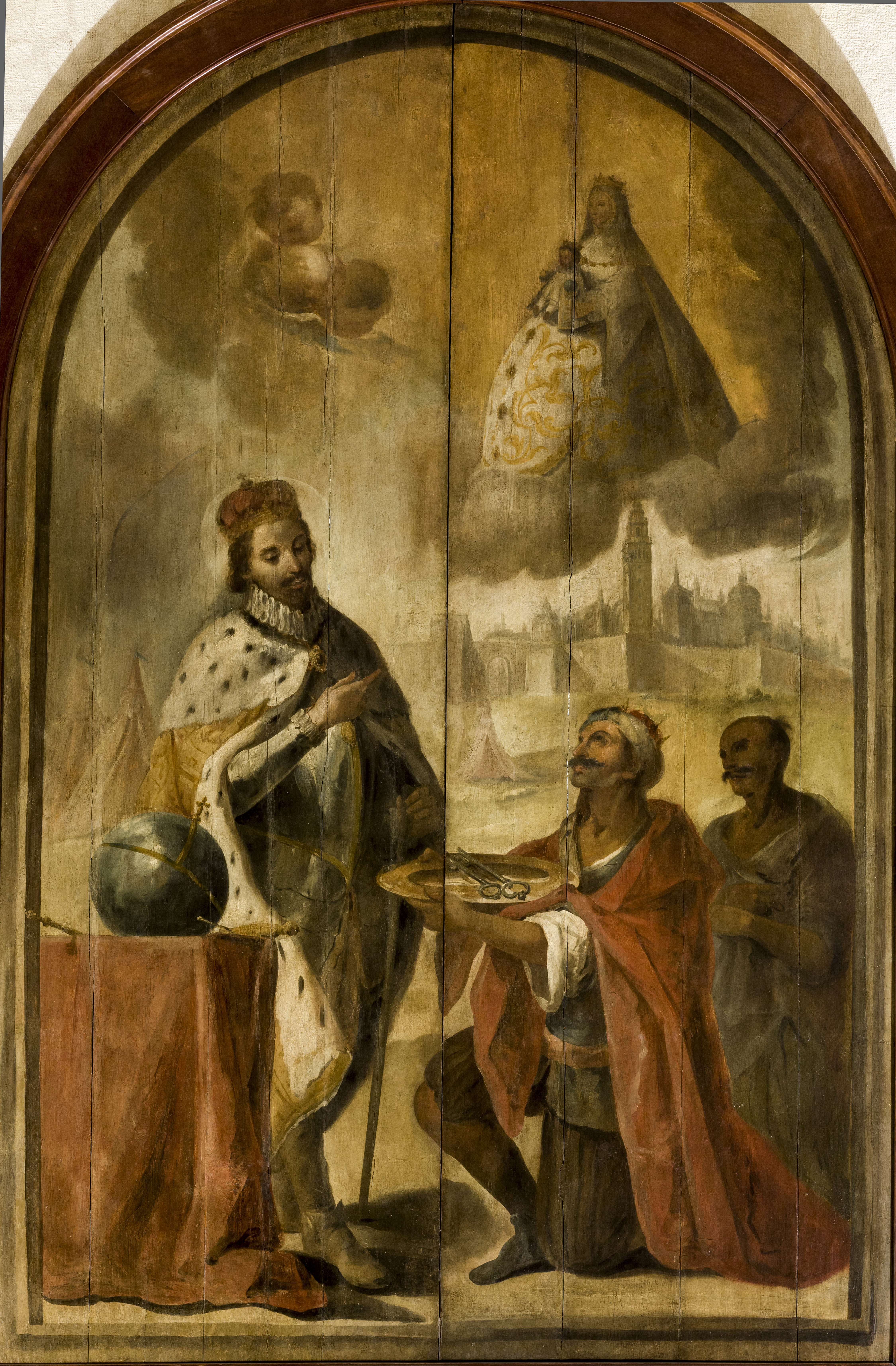 La obra representa al caíd Axataf entregando las llaves de la ciudad de Sevilla al rey Fernando III el Santo en 1252 frente a una de las puertas de la ciudad, siendo una obra ejecutada hacia 1750 y cuyo autor se tomó la licencia de hacer figurar la Catedral tal y como los cristianos la construyeron. El cuadro muestra también a la Virgen de los Reyes en los cielos en el momento de la entrega, y la obra procede de la antigua Puerta de san Fernando de la ciudad de Sevilla, que se encontraba al final de dicha calle y que fue demolida en 1868.